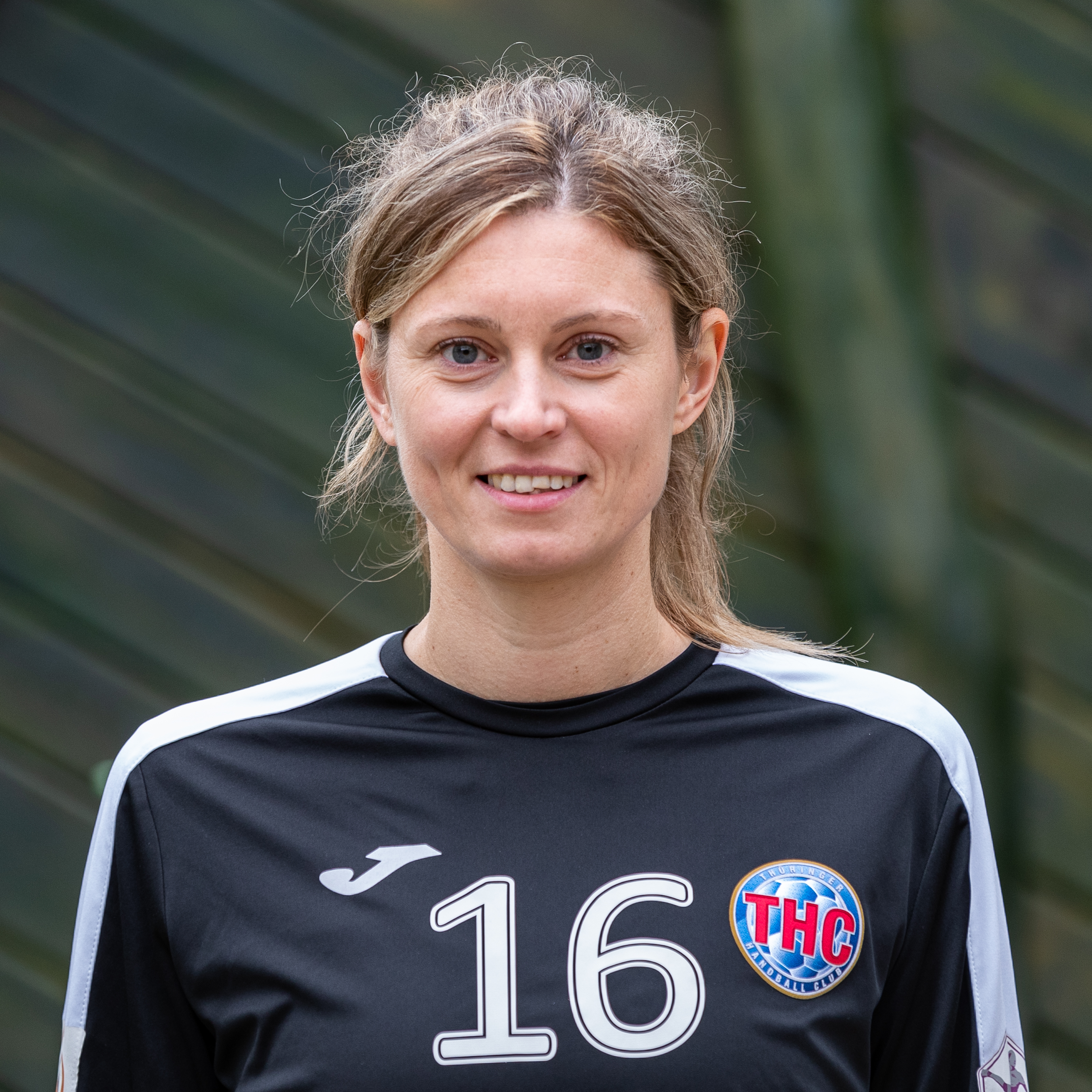 Handball, 1. Bundesliga Frauen, Thüringer HC, Teamfotos; Petra Blazek (Thüringer HC, 16, Torhüter); Porträt, Einzelbild